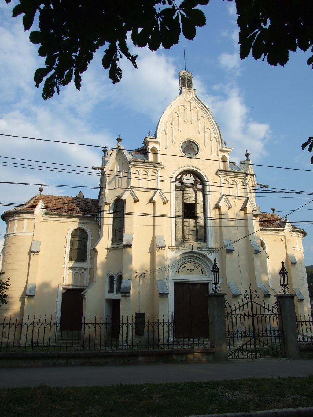 Sinagoga, Bistriţa, 2007.